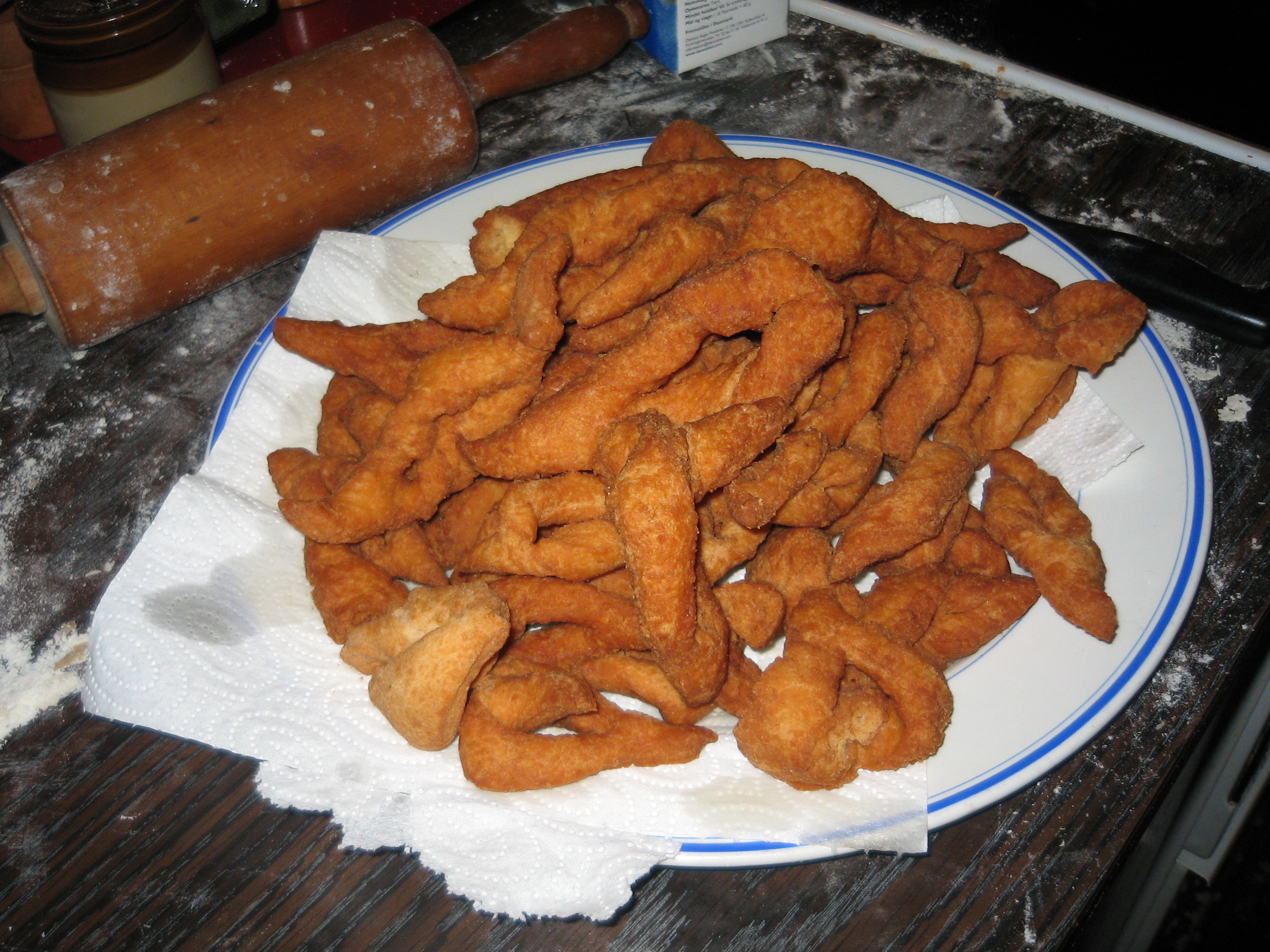 Klejner